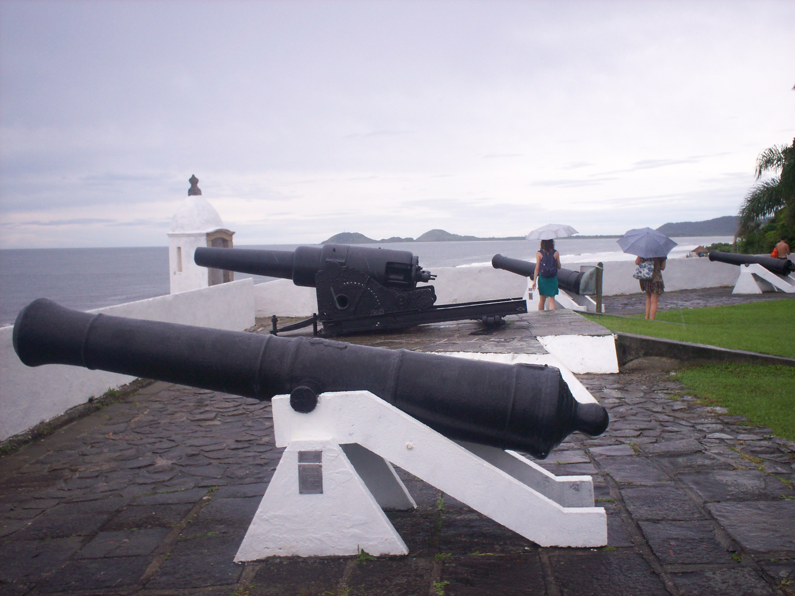 Canhões localizados na Fortaleza de Nossa Senhora dos Prazeres, na Ilha do Mel, Paraná, Brasi